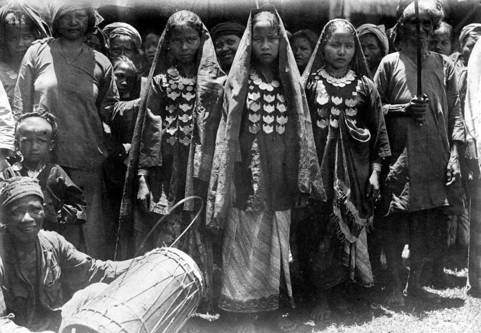 Repronegatief. Drie jonge bruiden op een huwelijksfeest te Jambi, Oost-Sumatra